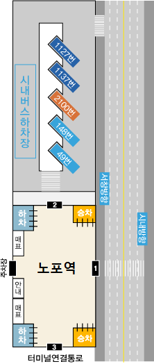 노포동역 배치도